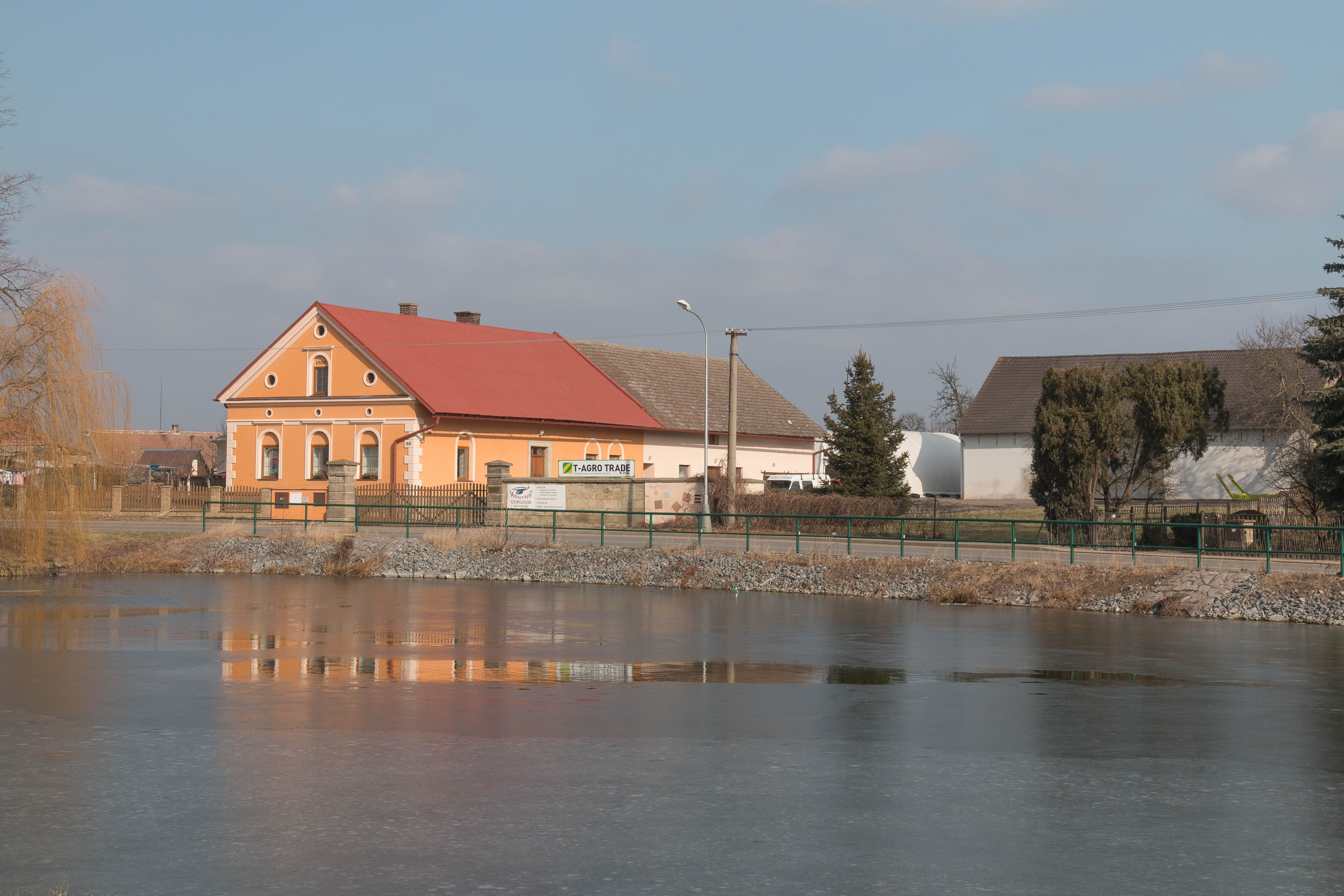 Vlčnov u Chrudimi čp 22